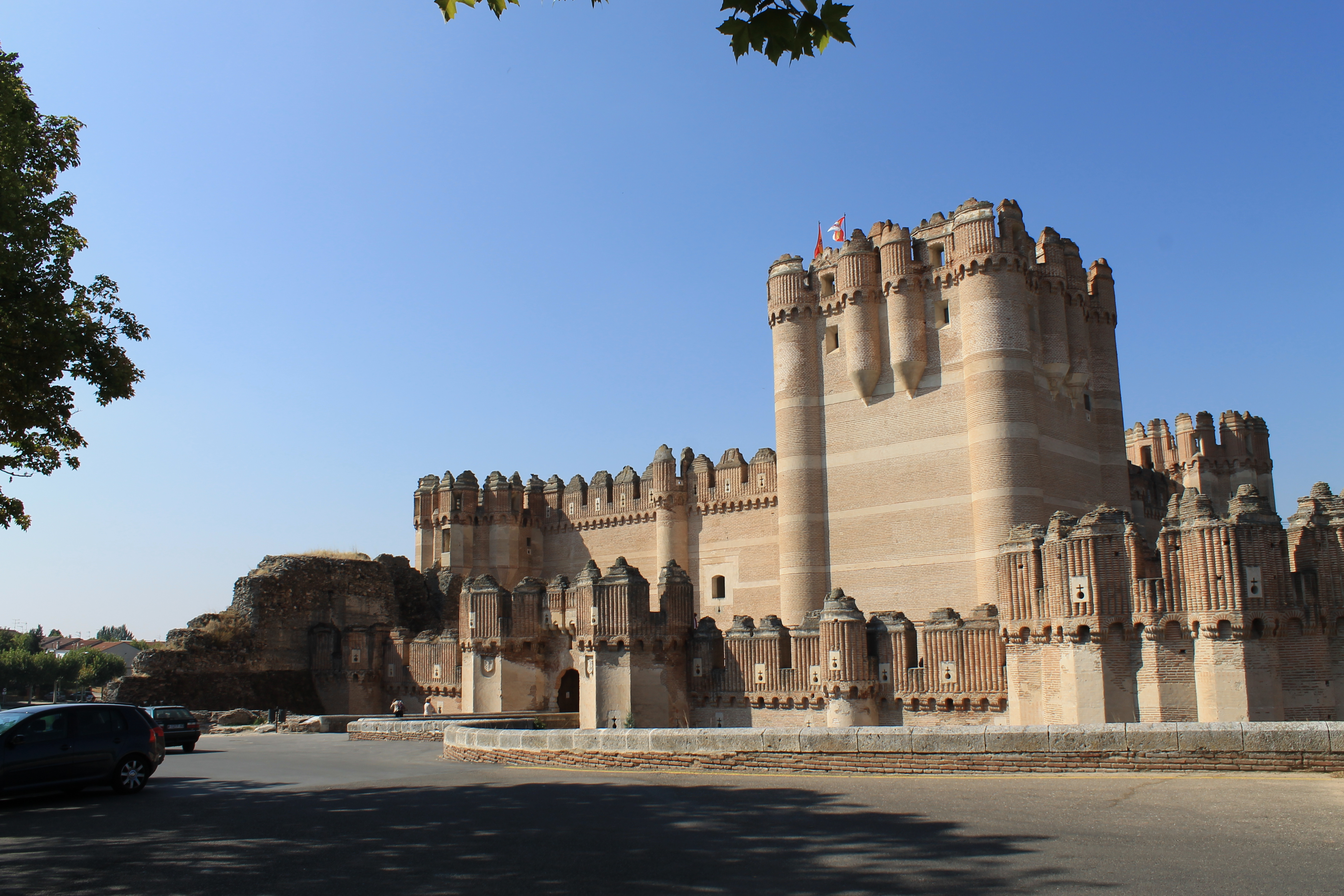 Castelul Coca, Provincia de Segovia